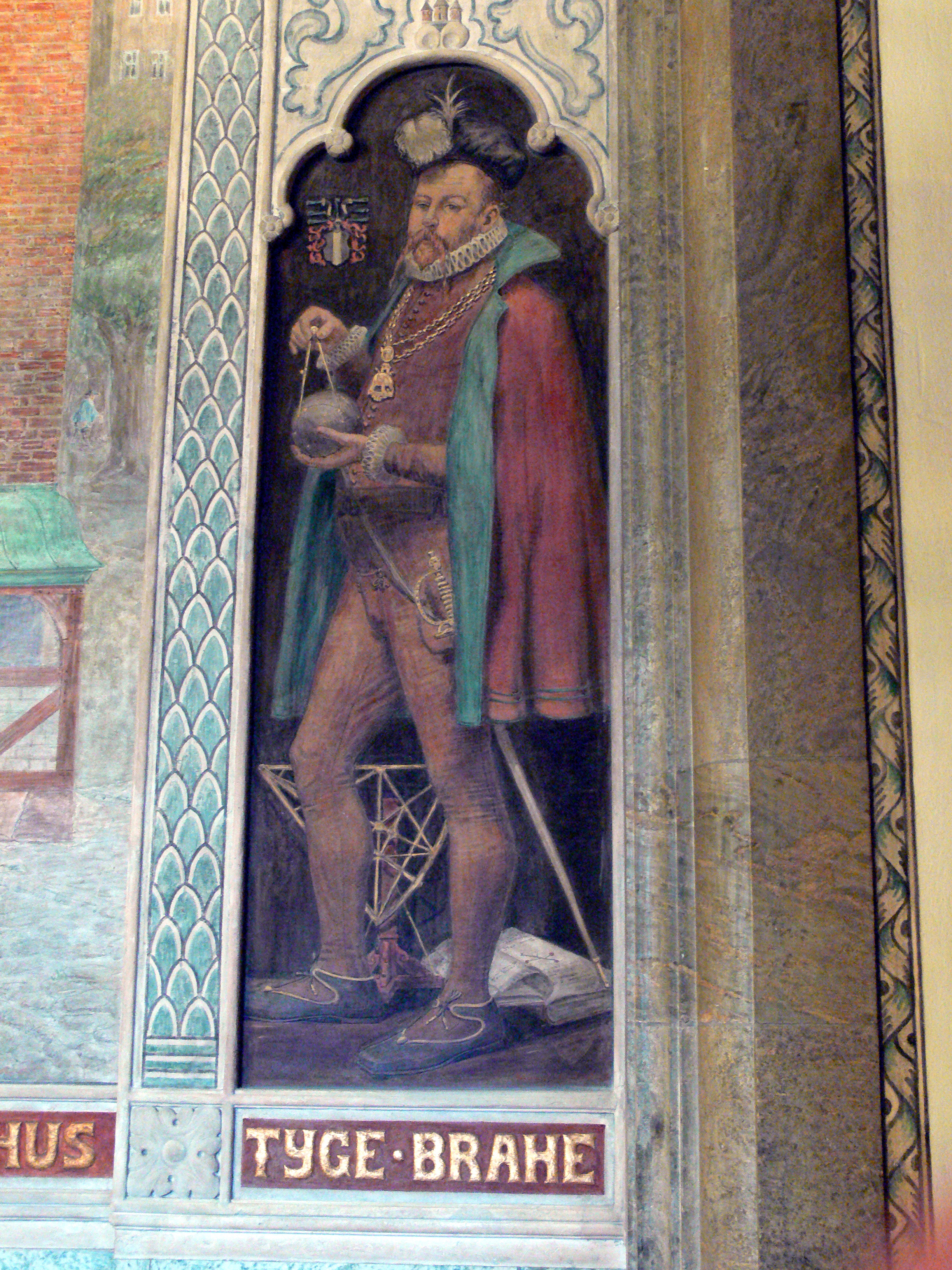 Tycho Brahe. Bild im Rathaus von Kopenhagen.